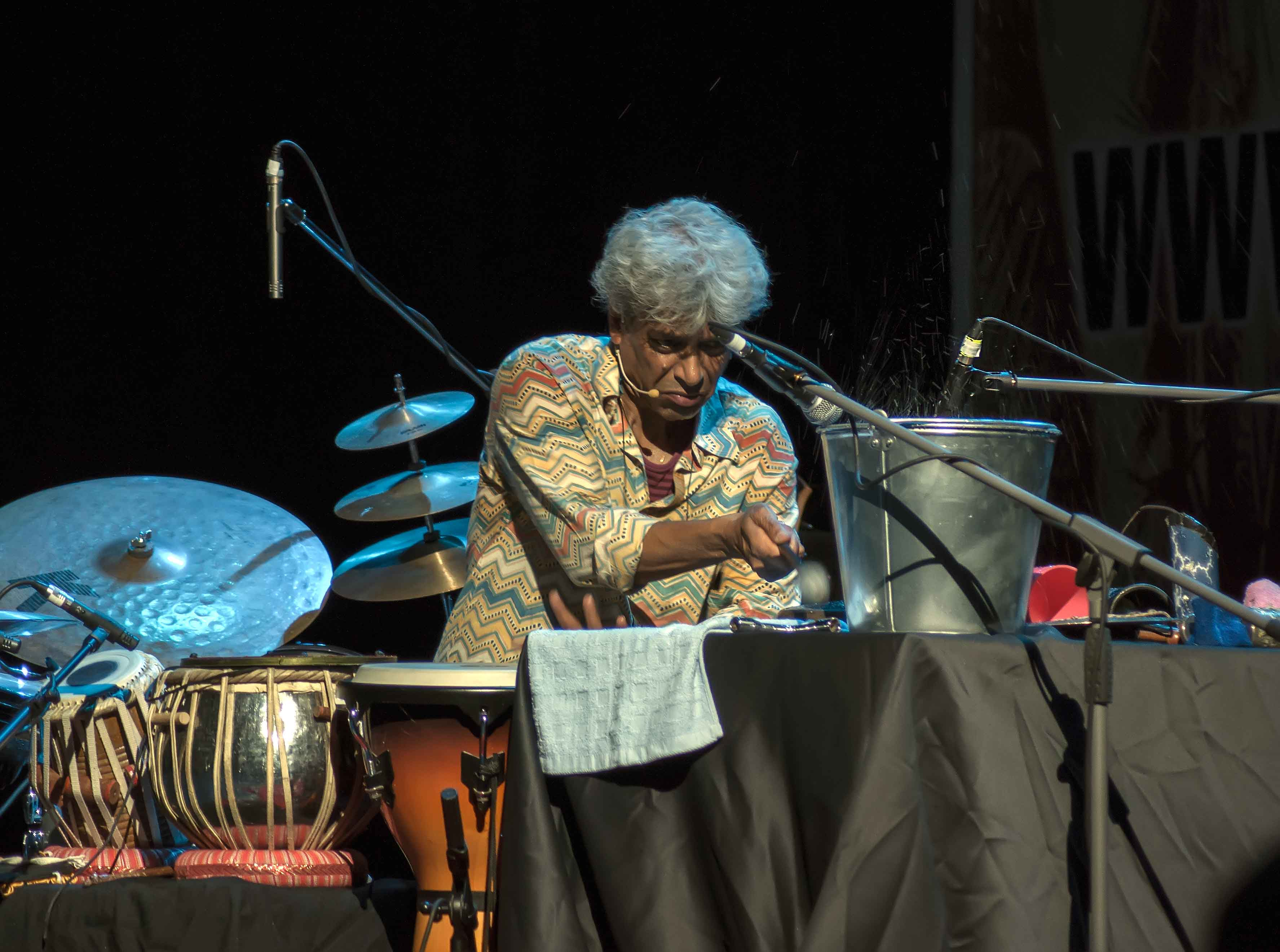 Sochi Jazz Festival